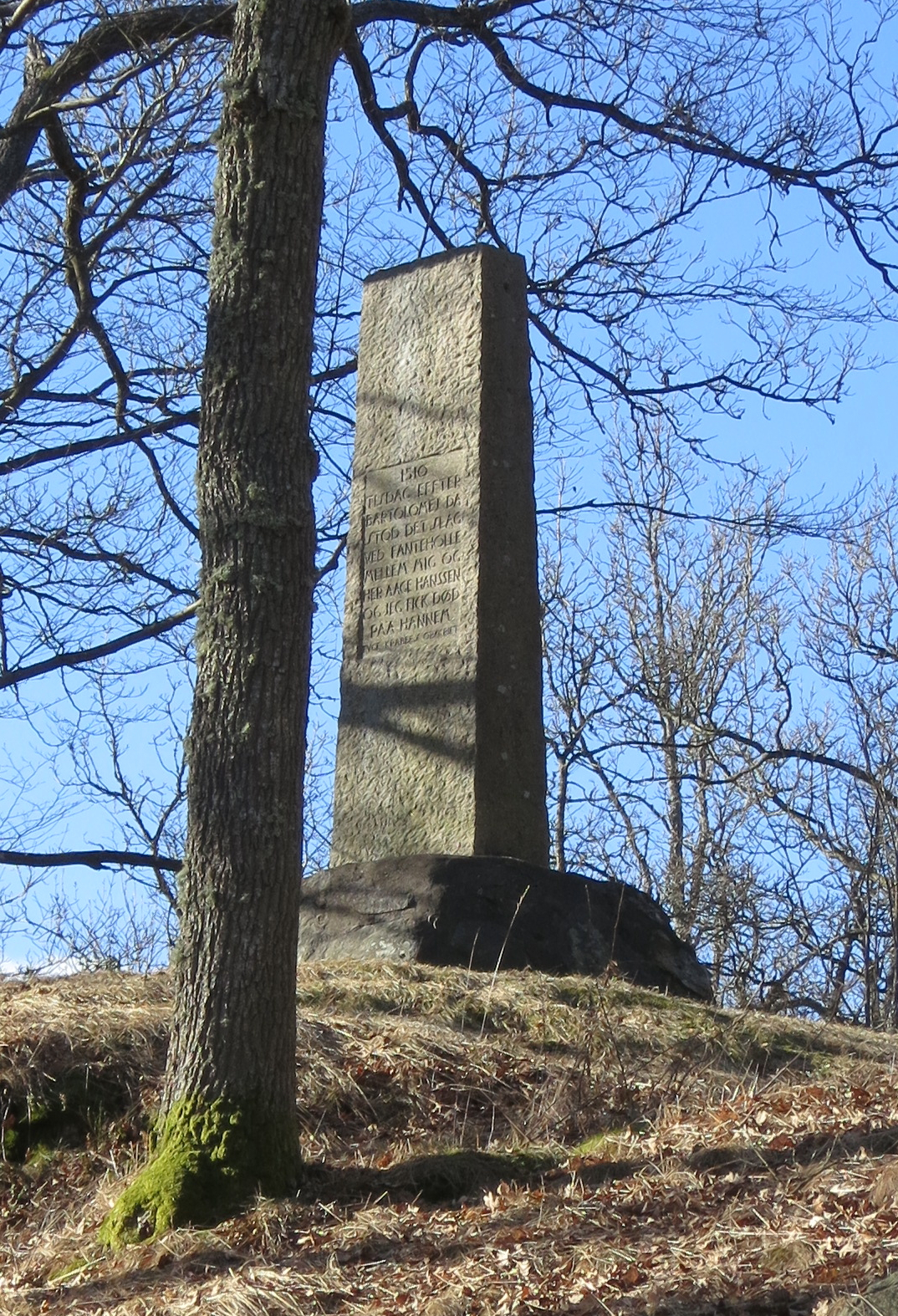 Minnessten över slaget i Fante håla 1510